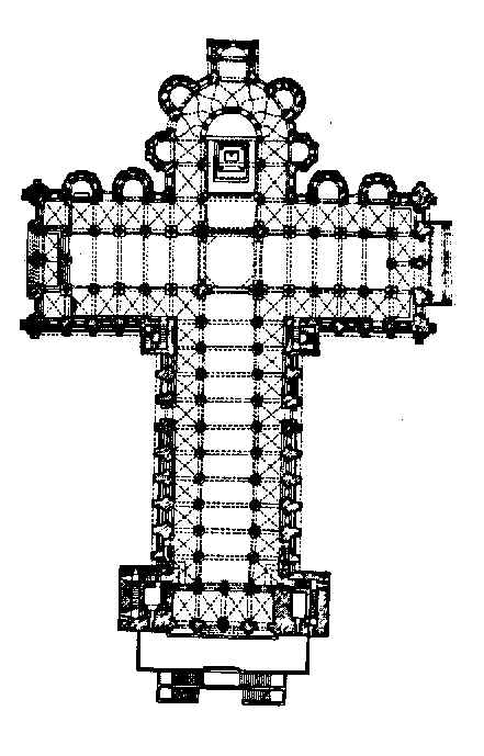 Oinplano Erromanikoa